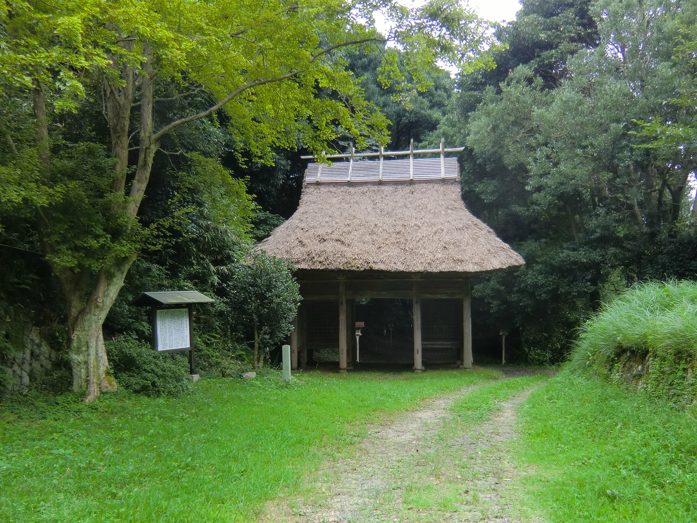 石城山神籠石（光市）の随身門